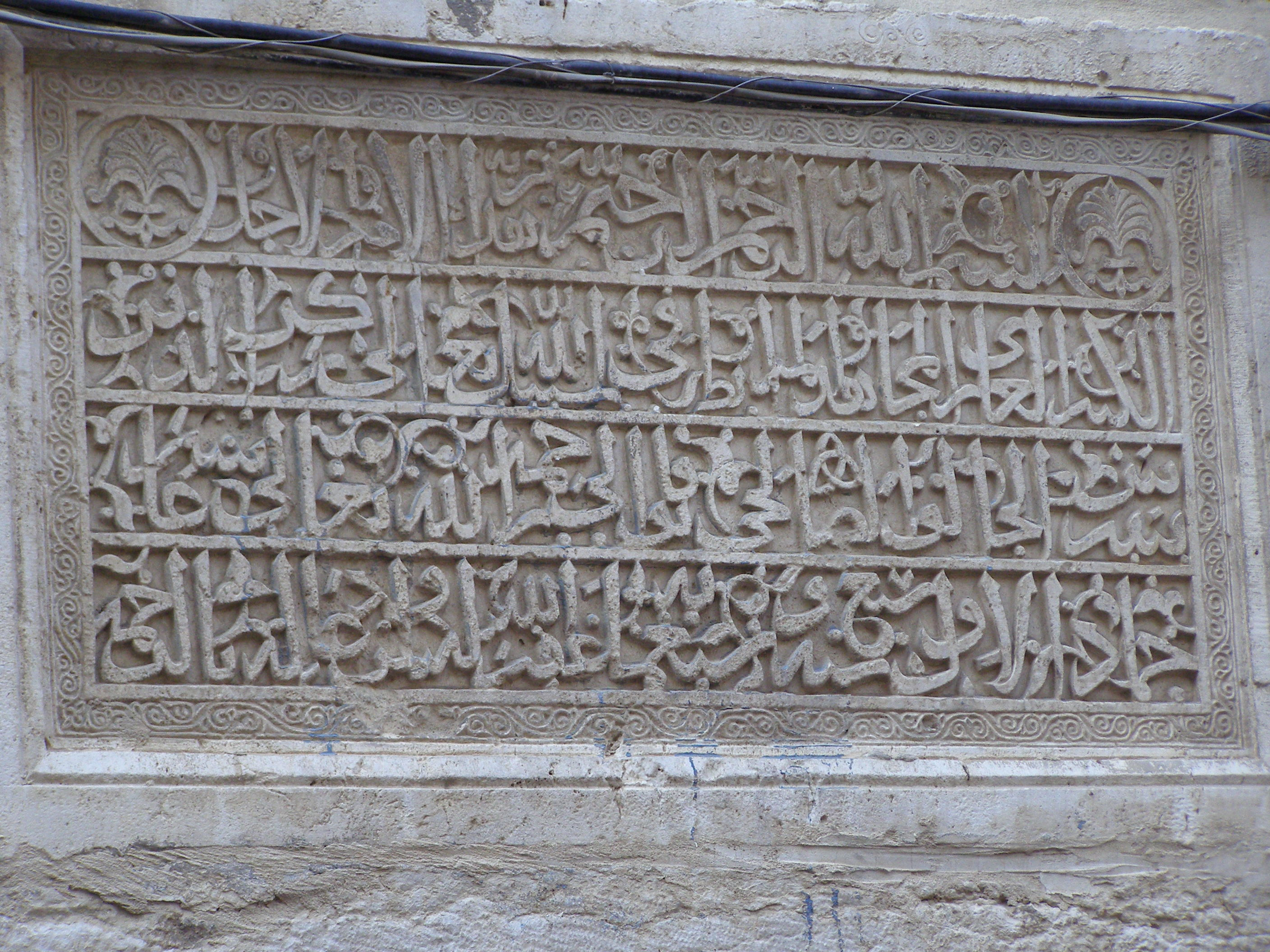 כתובת הקדשה ממלוכית (על האמה) רישיון נוצר על ידי משתמש:Ranbar